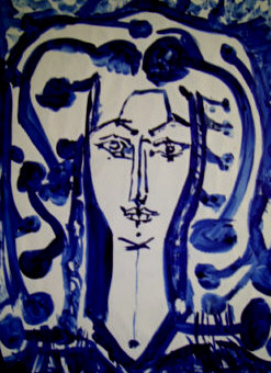 Dagmar Anders "Begegnung mit Pablo Picasso 1970", Ölpastell